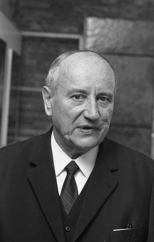 Eröffnung einer Kunsthandwerks-Ausstellung durch den niedersächs. Min. Präs. Diederichs in der Landesvertretung Niedersachsen